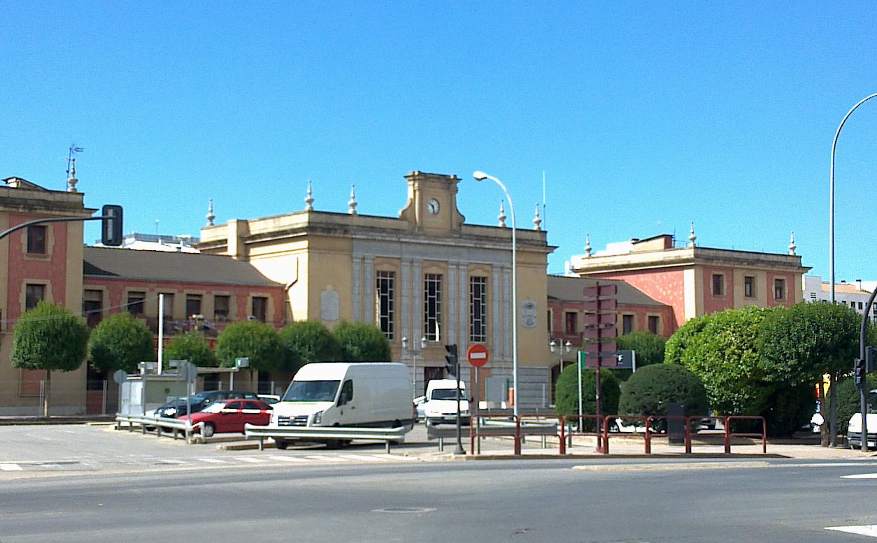 Antigua estación de trenes de Logroño (La Rioja)